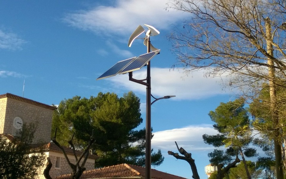 Installation de deux lampadaire autonomes hybrides dans le technopole méditerranéen de l'Arbois à Aix en Provence